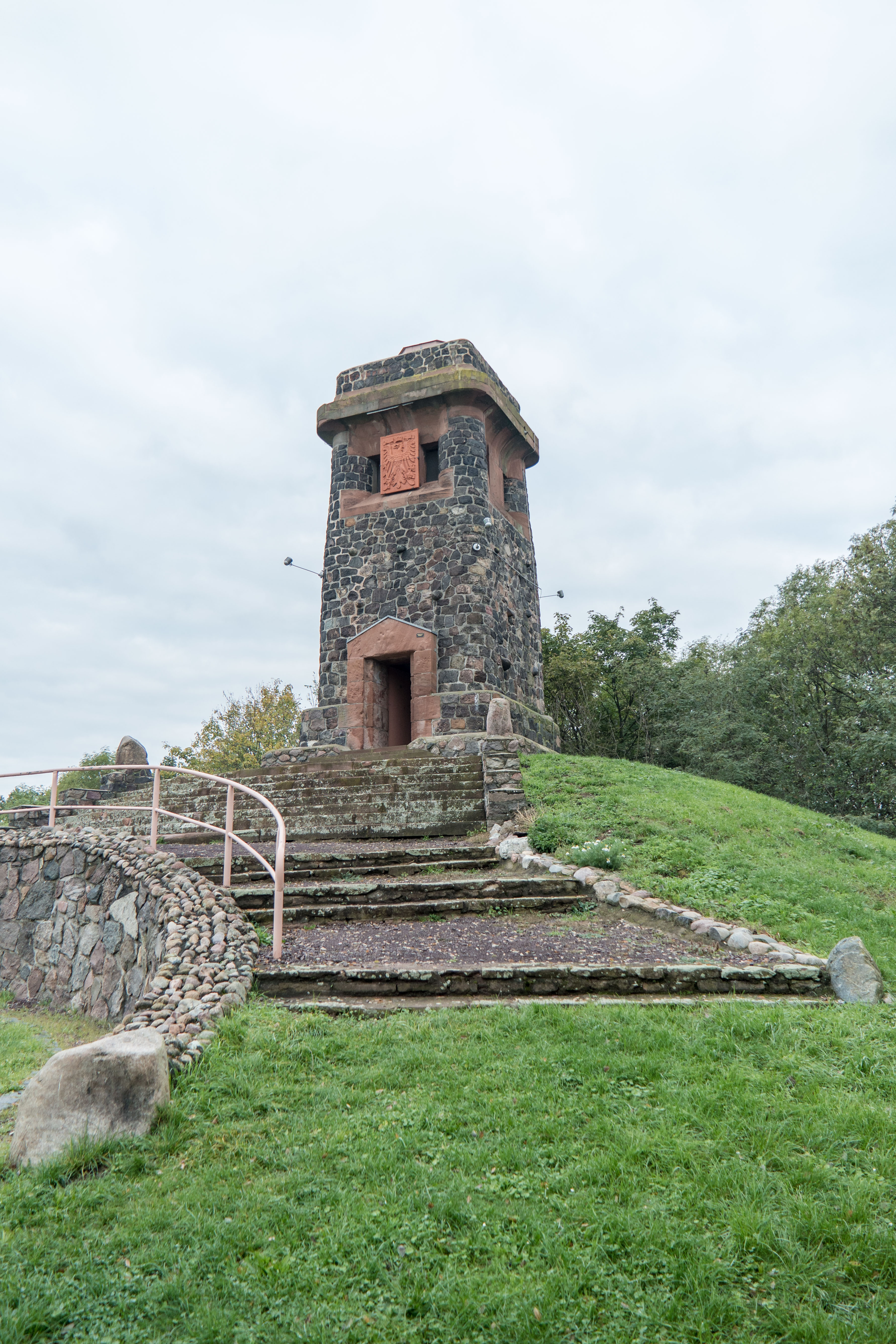 Bismarckturm Schnarsleben